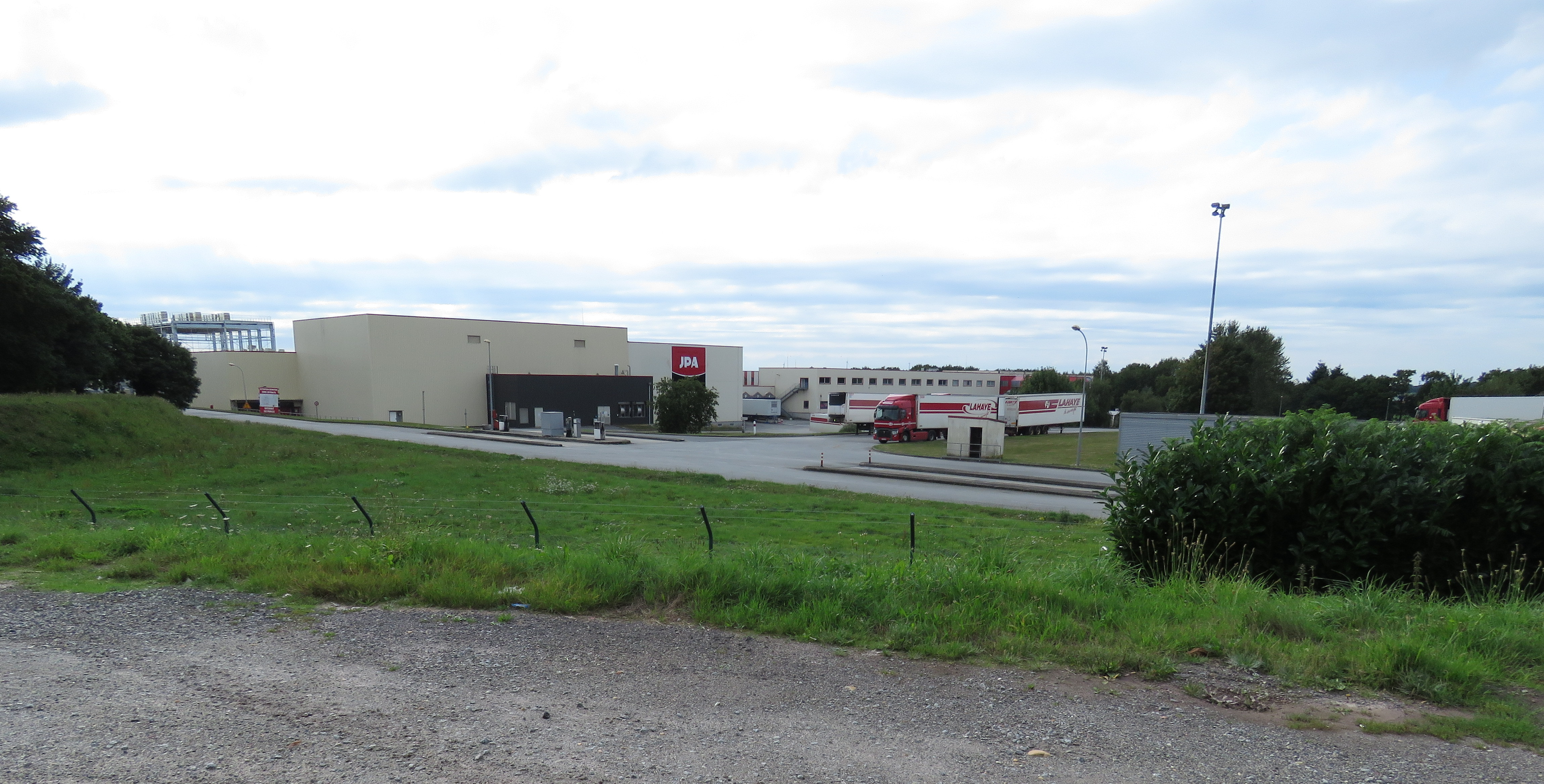 Ex-abattoir Gad.